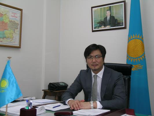 Қазақша (кирил): дипломат